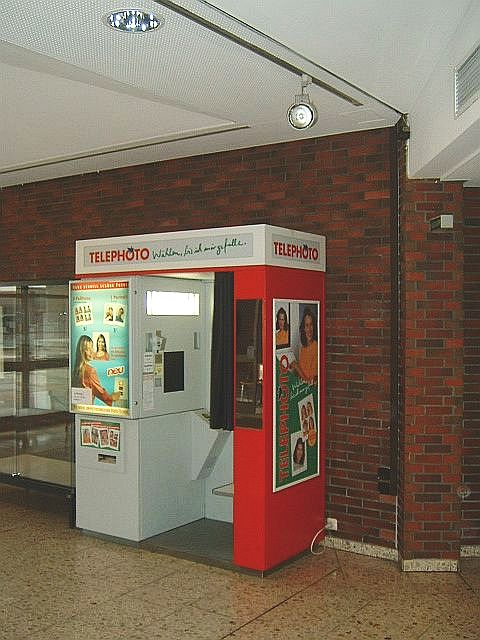 photoautomat in einem Rathaus zwecks anfertigung schneller Passbilder (in Schwarzenbek )